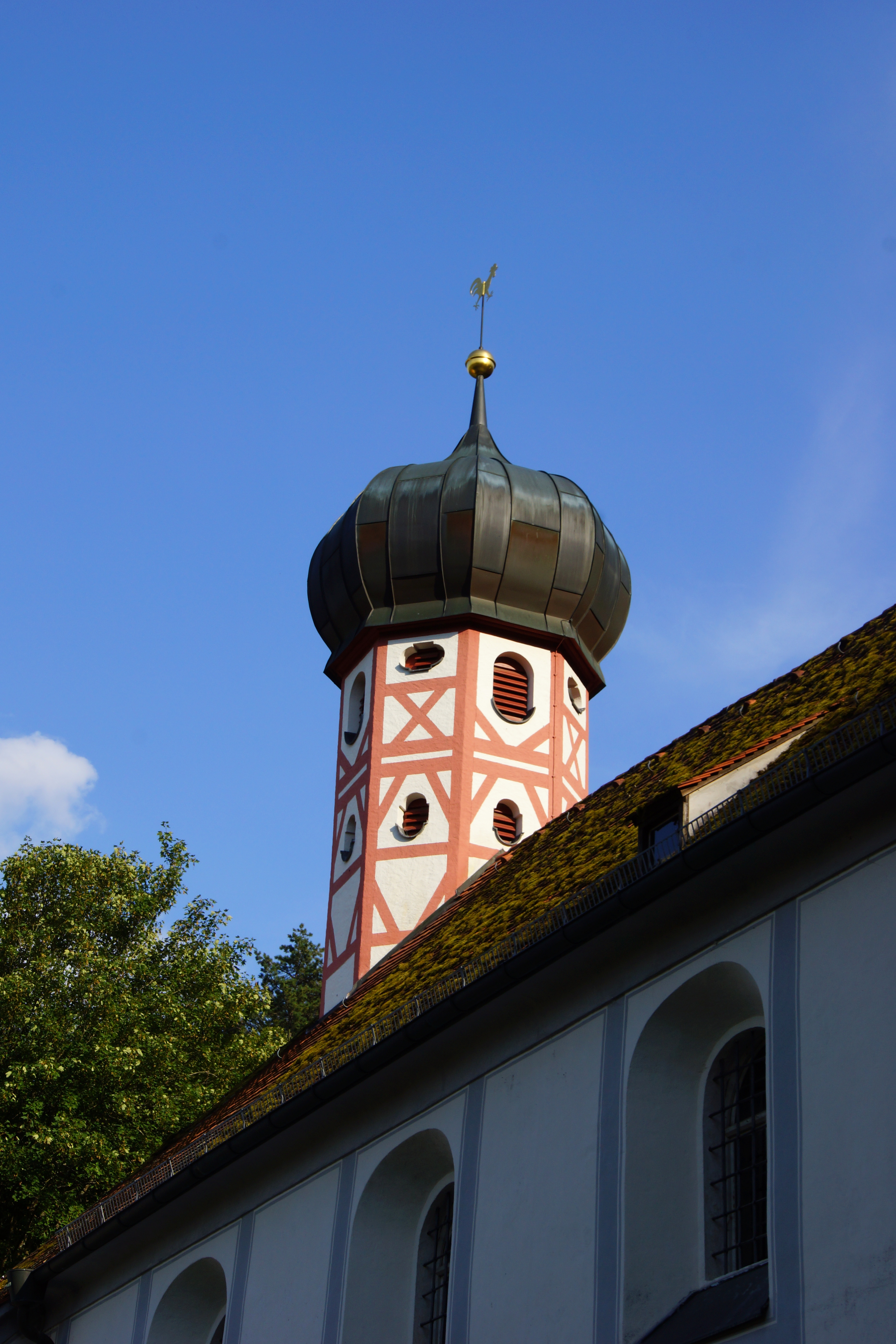 Die Wallfartskirche Maria End in Altendorf, Markt Mörnsheim bei Eichstätt